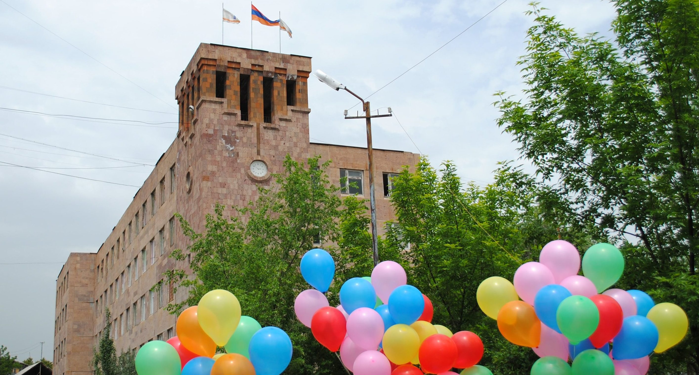 Շիրակացու ճեմարանի ավագ մասնաշենքը